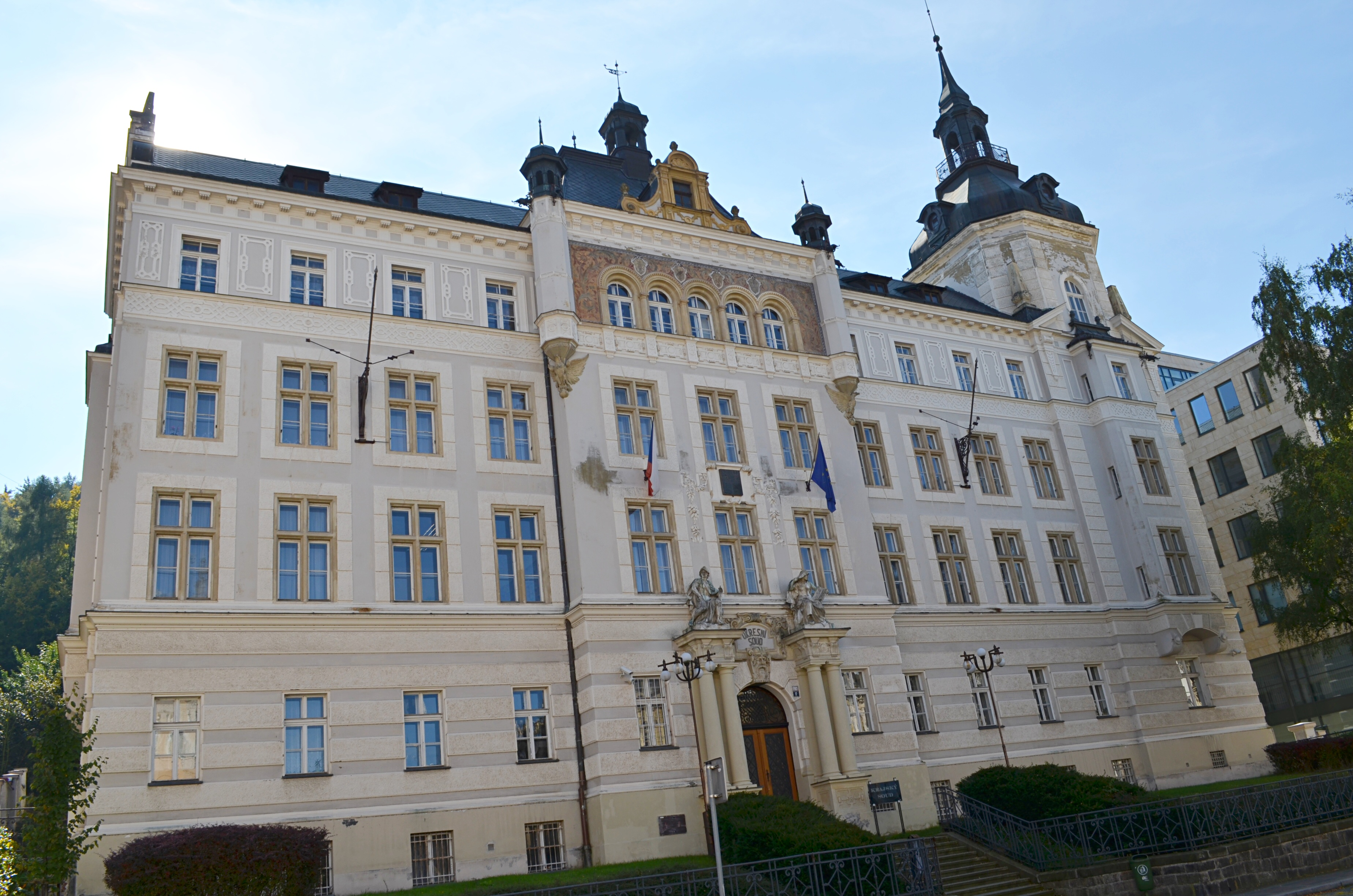 Soudní areál, Moskevská 1163/17, Karlovy Vary.